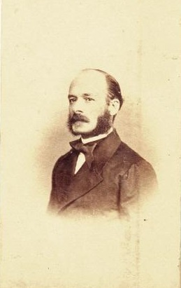 Ilmo. Sr. D. Braulio Antón Ramírez, fotografía de J. Laurent. Museo de Historia de Madrid